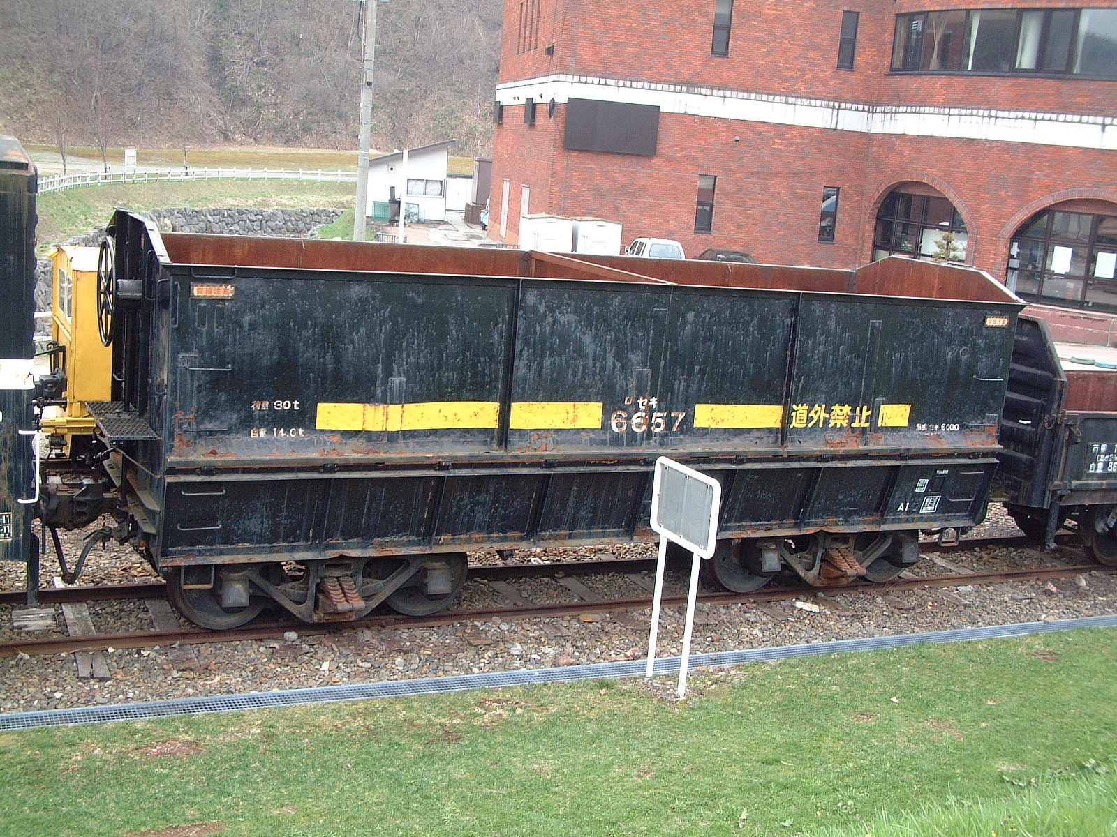 三笠鉄道村（三笠鉄道記念館前）で保存中のセキ6000形石炭車。